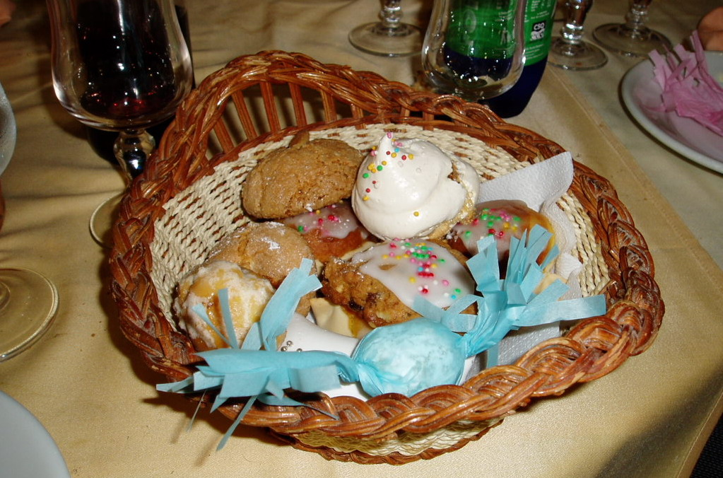 Dolci tradizionali della Sardegna: Gueffus, amarettus, bianchini, pabassinas e piricchittus